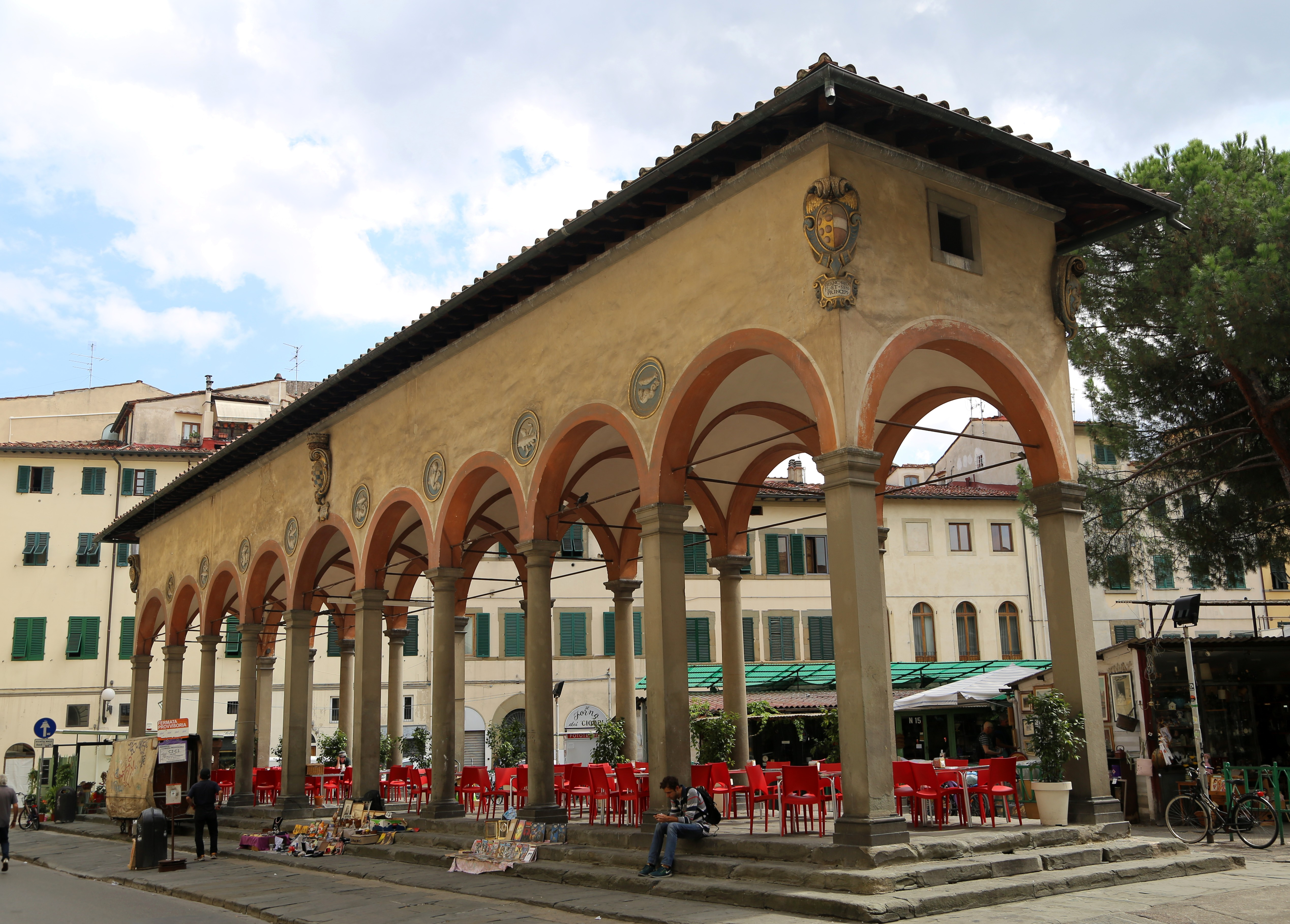 Loggia del Pesce, Piazza dei Ciompi, Florenz